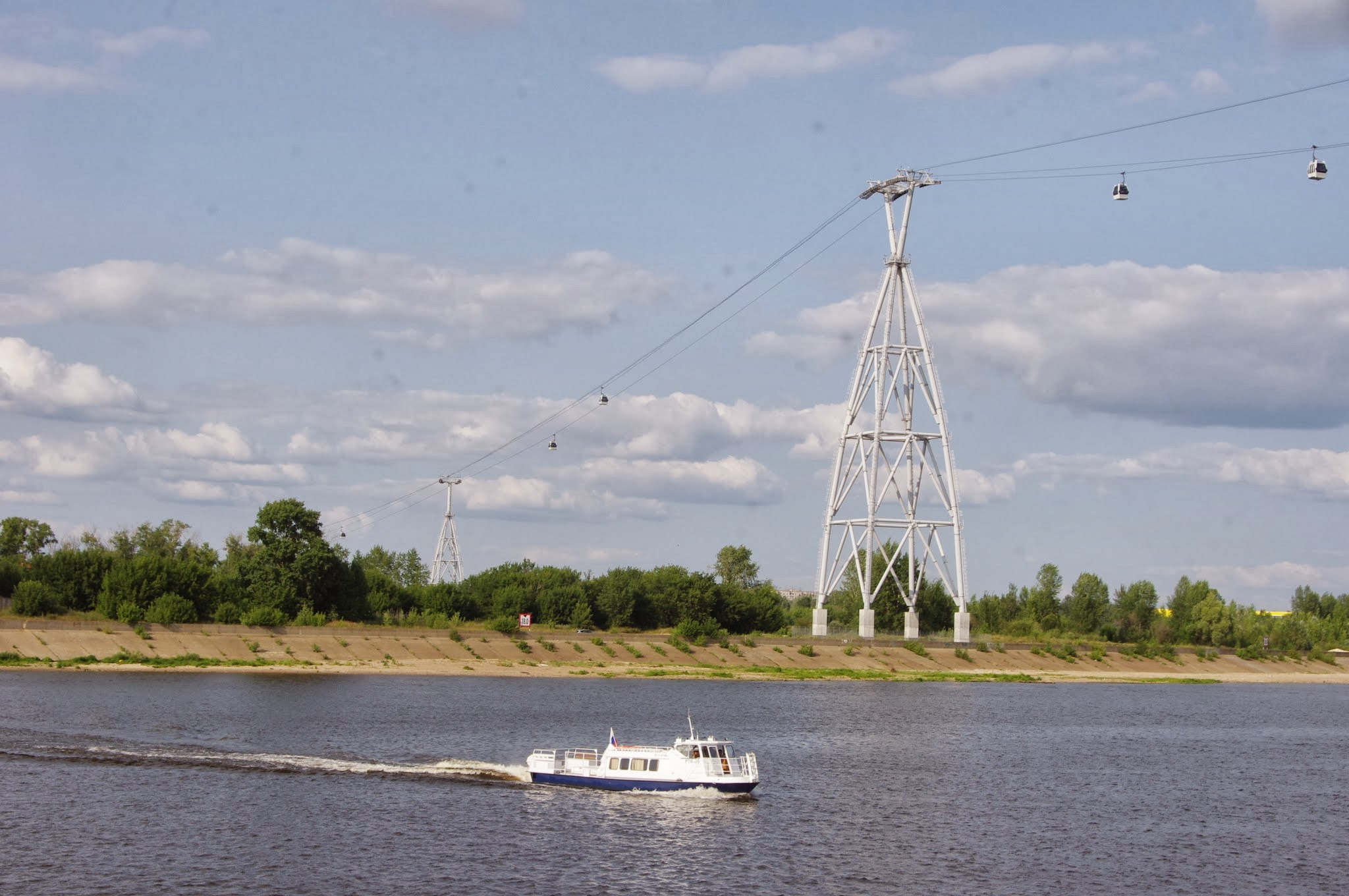 Internatsionalnaya ul., Nizhegorodskaya oblast', Russia, 606440